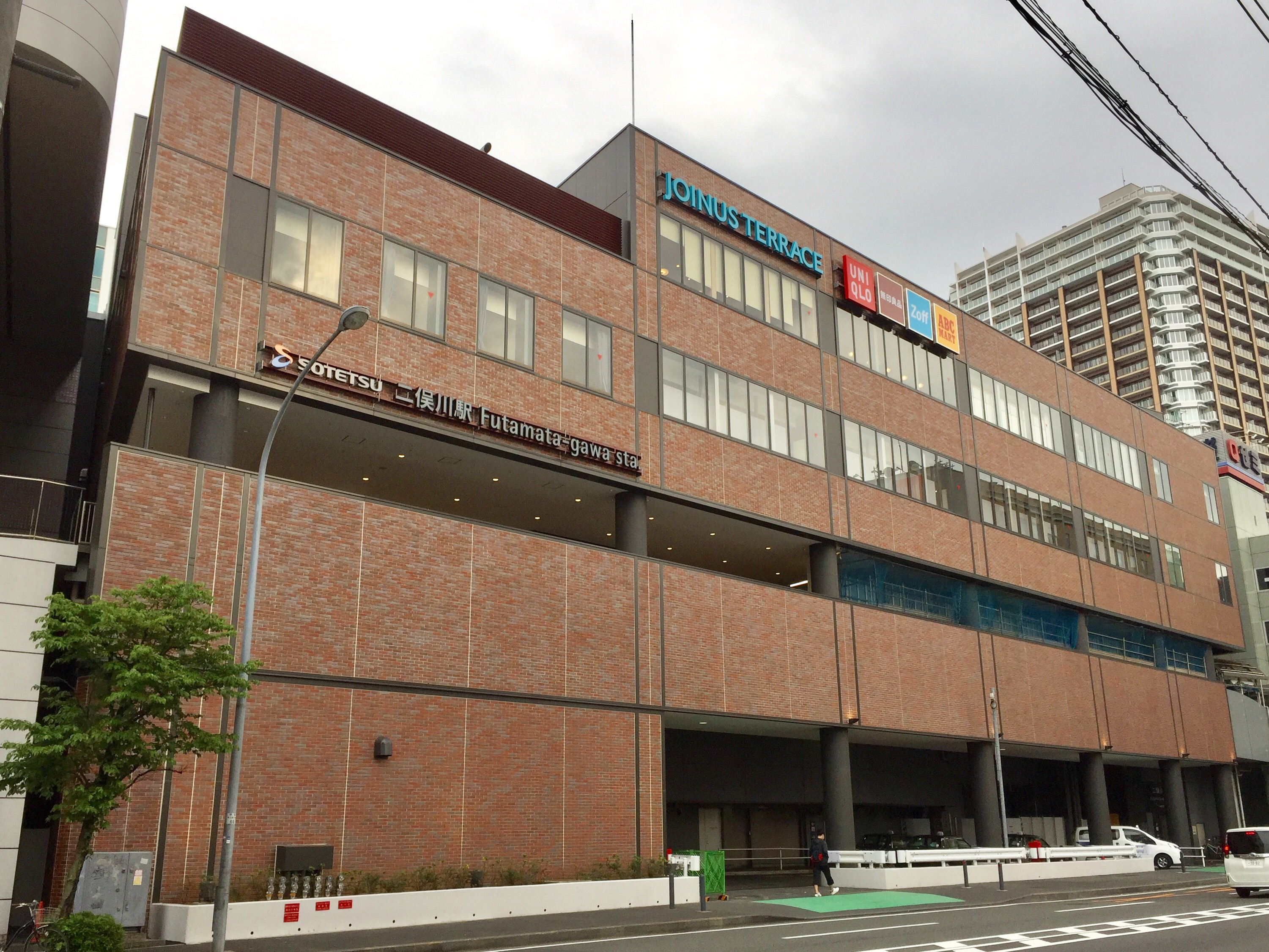 二俣川駅駅舎の外観（北側より撮影）。相鉄デザインブランドアッププロジェクトに基づき、レンガを用いた外観にリニューアル。上部はJOINUS TERRACE 二俣川（ジョイナステラス2）。